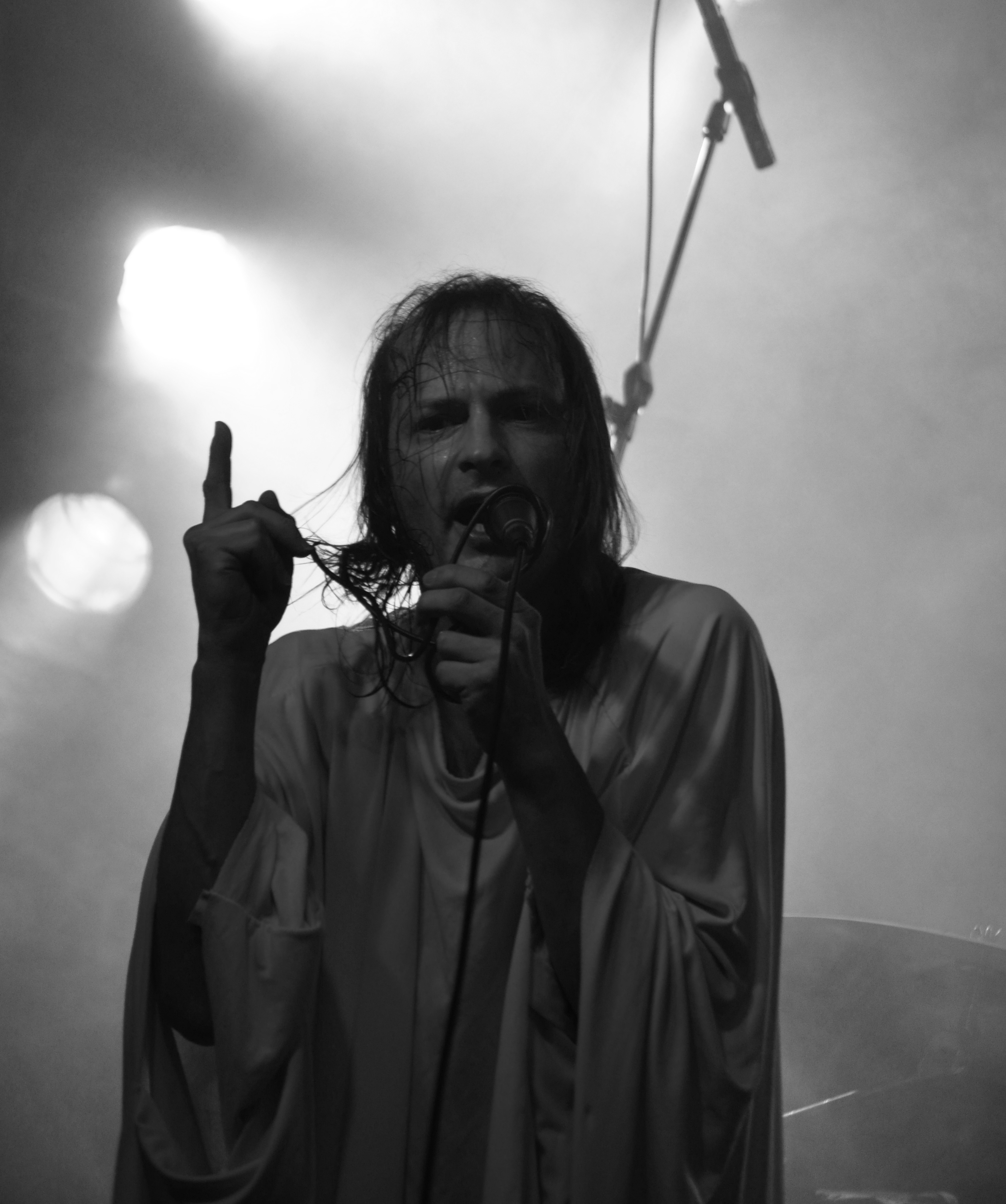 Mono für Alle! auf der Weltuntergangstour 2013 in Rostock